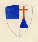 Stemma della famiglia Buondelmonti